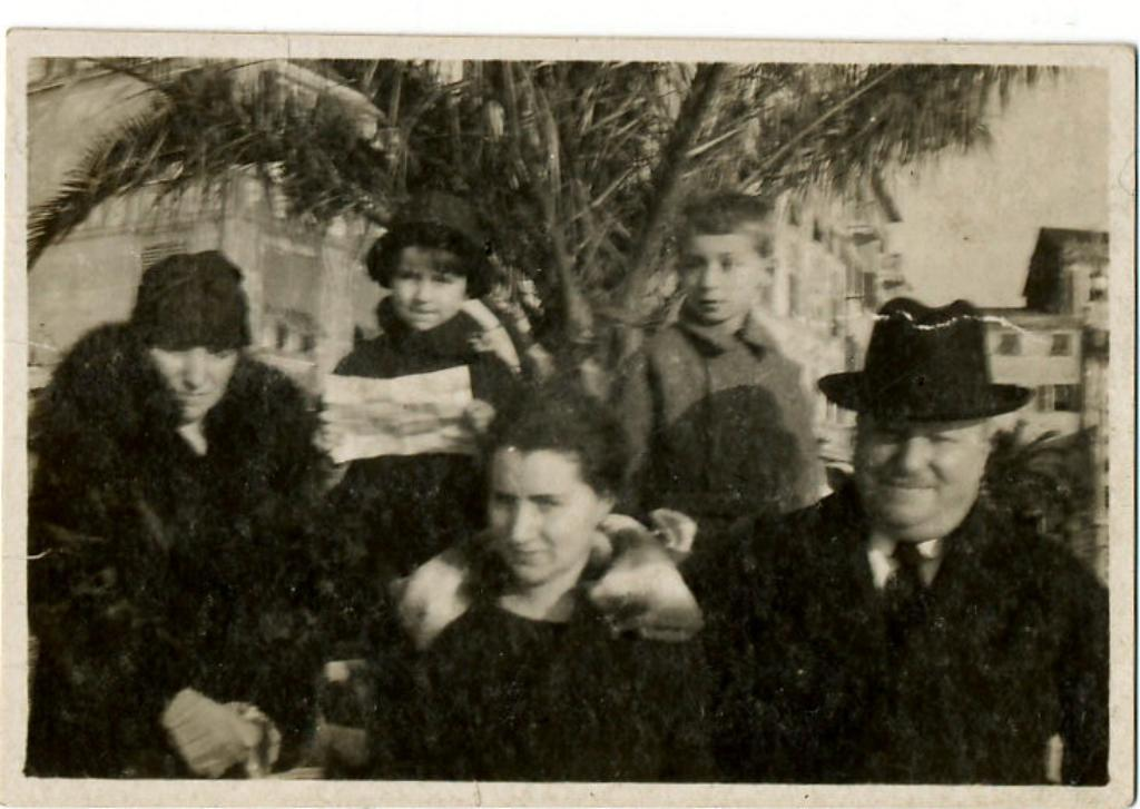 Ritratto di gruppo familiare, gennaio 1927